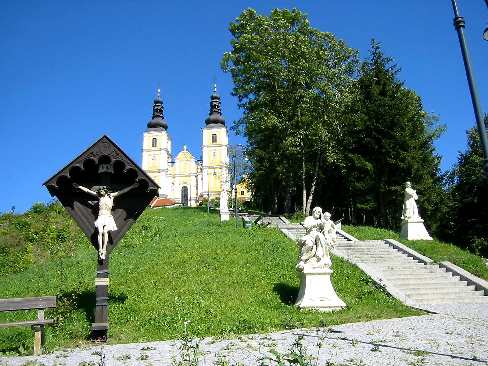 Basilika Mariae Geburt